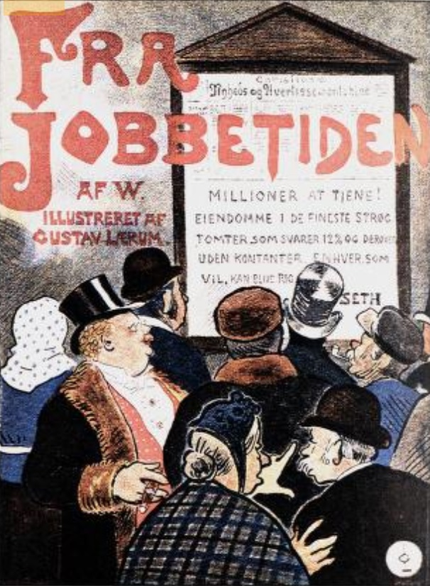 Gustav Lærum-forside fra en bok i 1903 om jobbetiden i Kristiania på slutten av 1800-tallet.